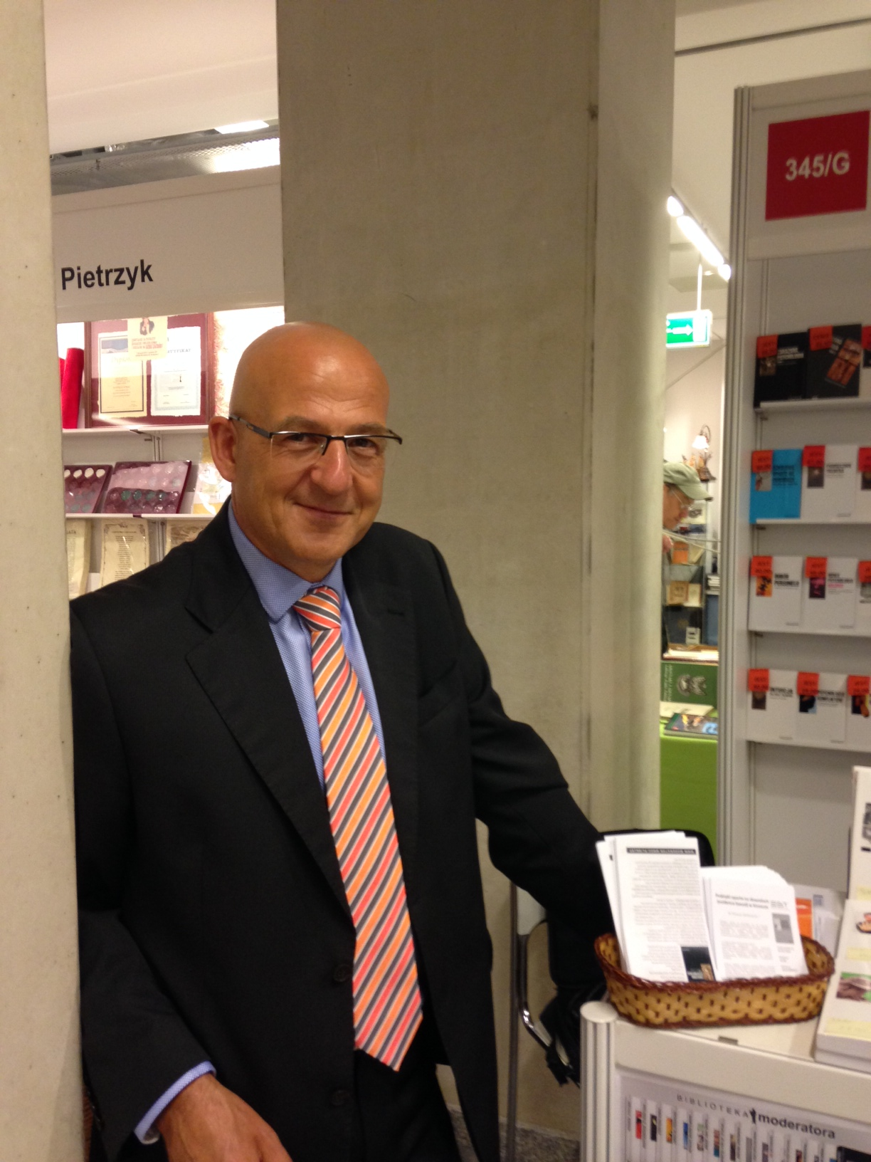 Tomasz Witkowski na Warszawskich Targach Książki w dniu 24 maja 2014 roku.